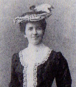 来日当時1903年のハジス